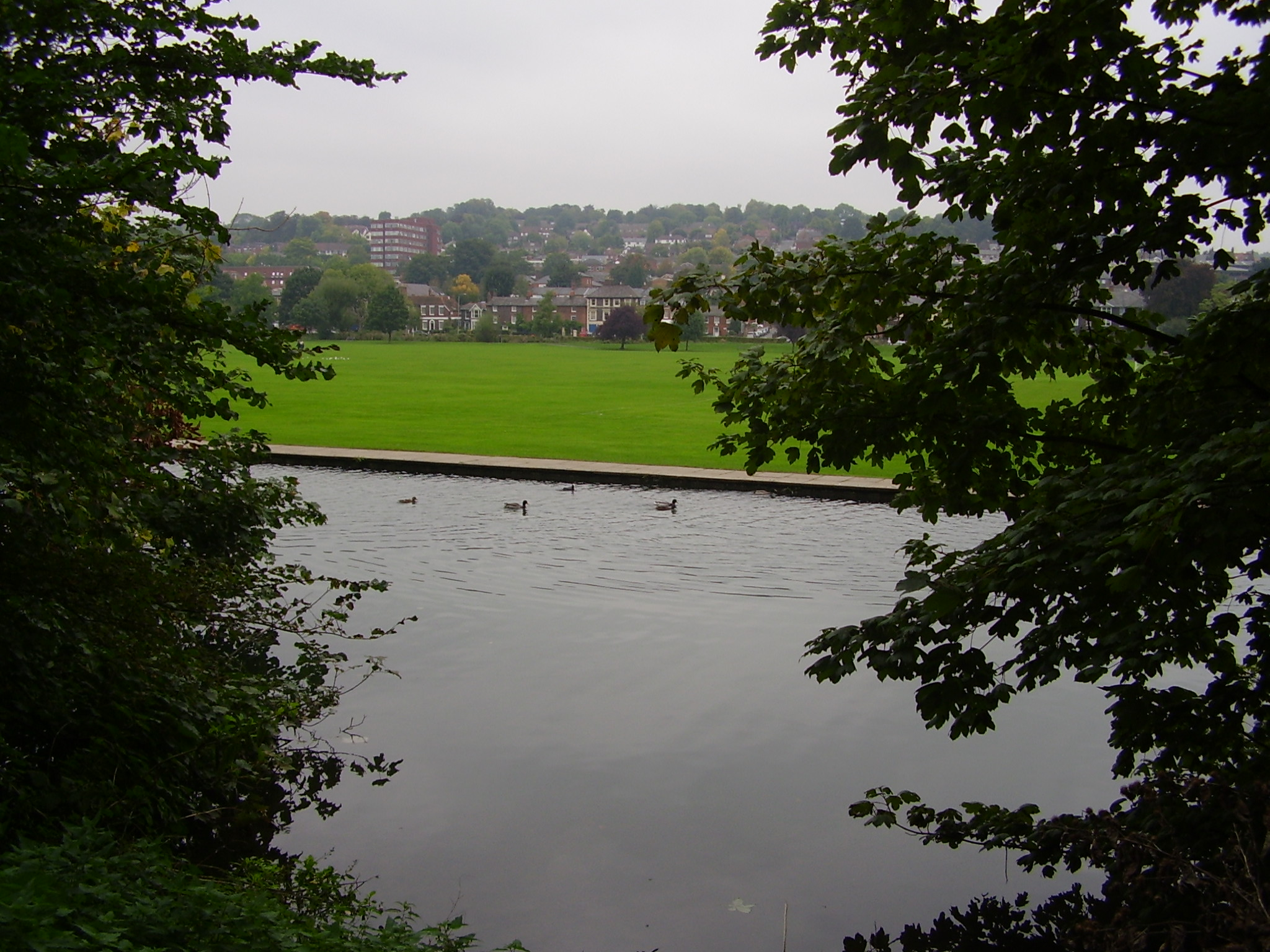 High Wycome vue de la rivière The Dyke